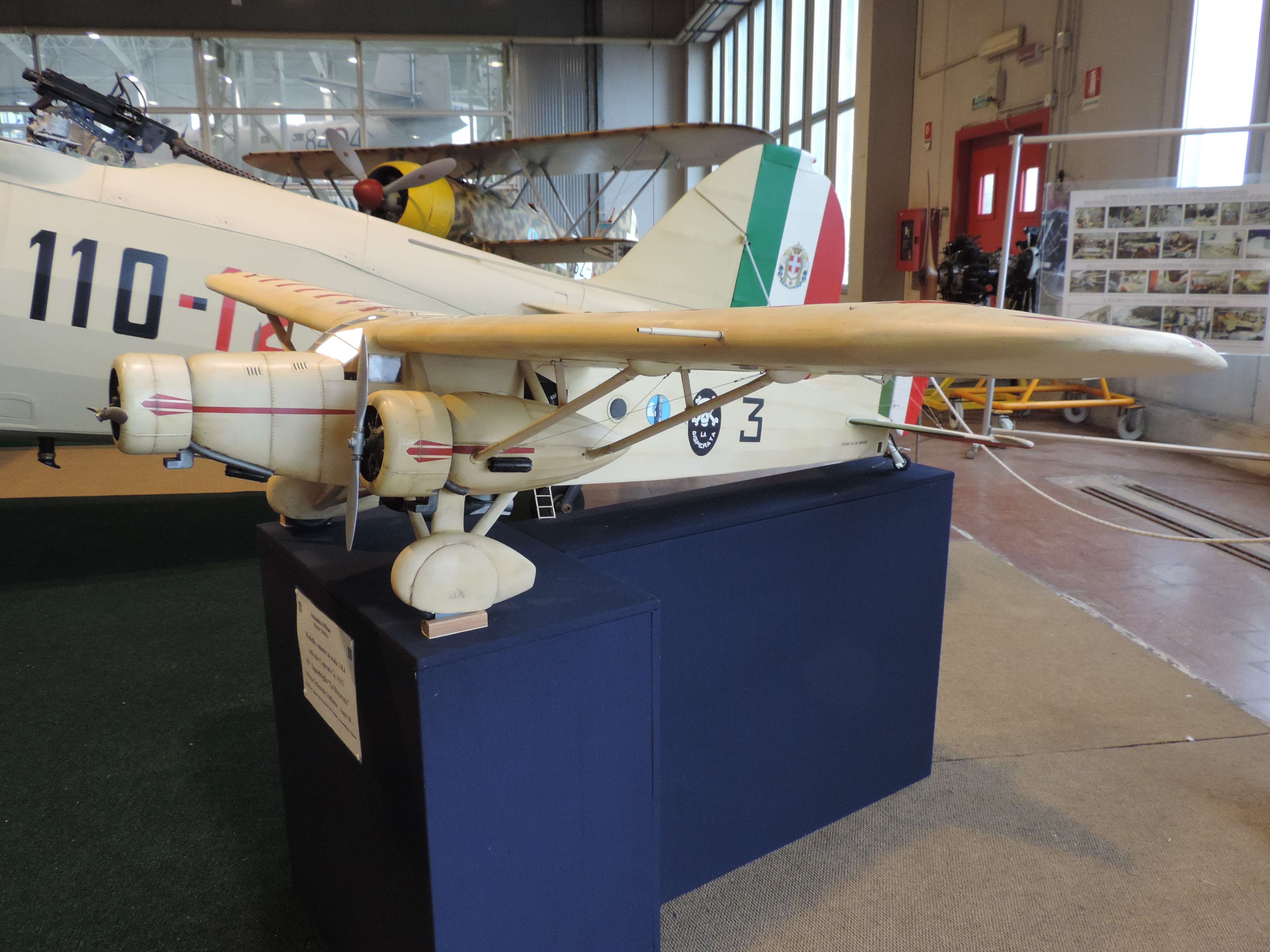 Caproni Ca.133T Modell im Luftwaffenmuseum Vigna di Valle